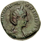 Portret van Salonina, keizerin, vrouw van Gallienus, op een Romeinse sestertie van 20.86 g., geslagen in Rome circa 255-257. Legende (voorzijde): [COR]NELIA SALONINA AVG.